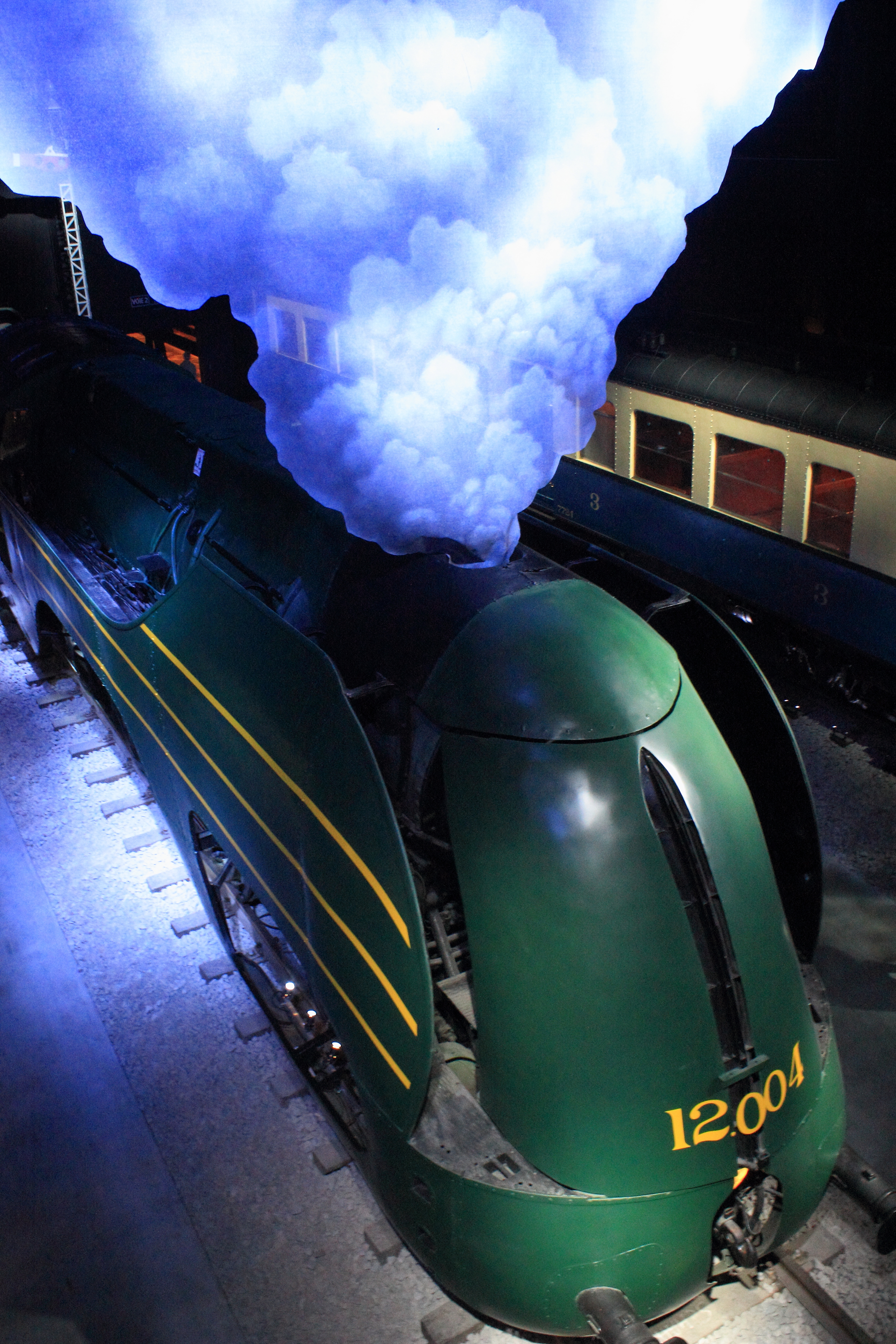 Locomotive type 12 (SNCB), Trainworld, Schaerbeek, Bruxelles